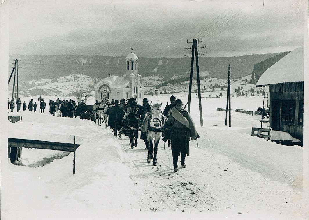 Domobranska kolona, zima 1942.